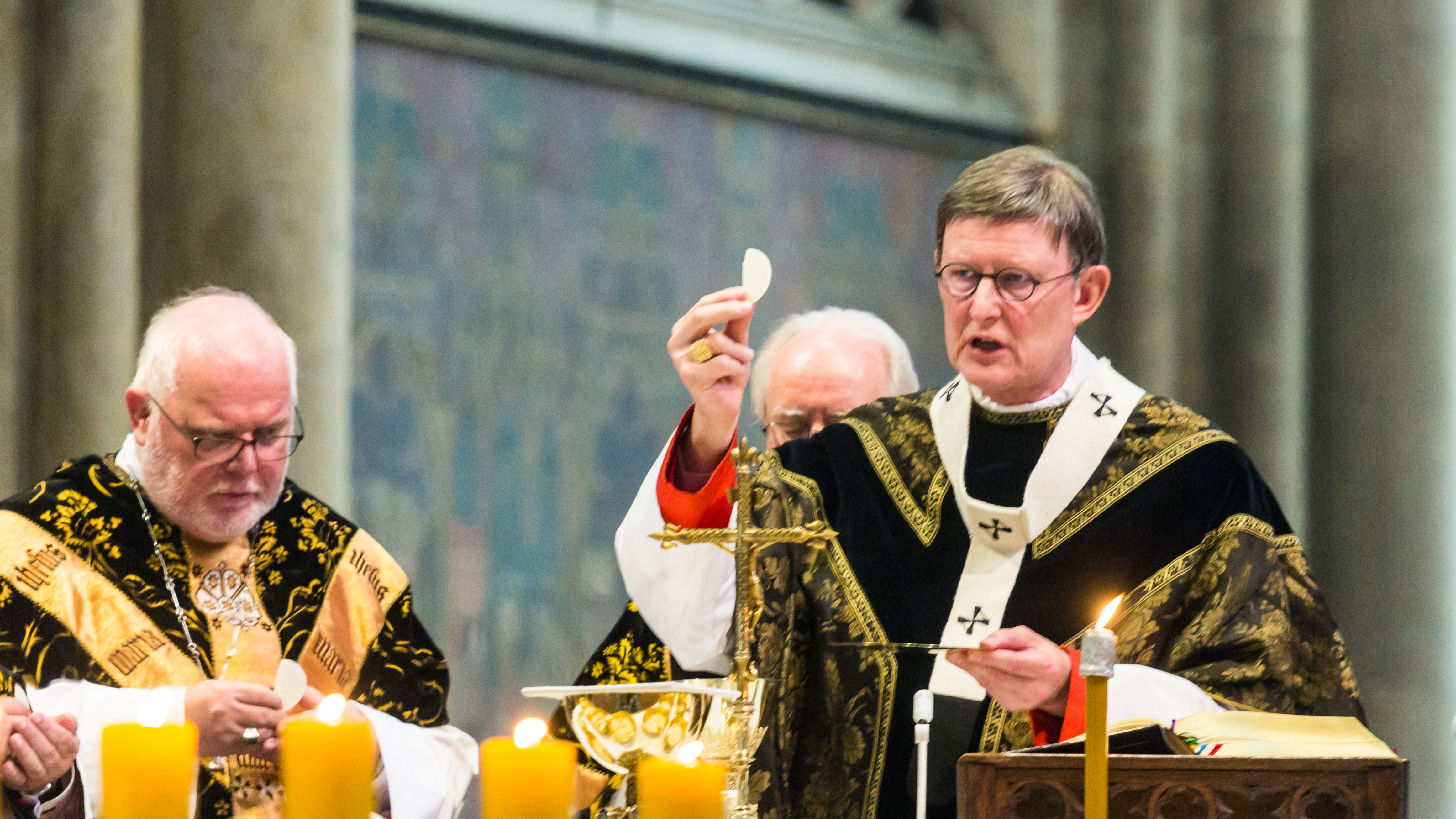 Exsequien Joachim Kardinal em. Meisner Foto: Kardinal Woelki erhebt die gebrochene Hostie zu den Worten: „Seht das Lamm Gottes, das hinwegnimmt die Sünden der Welt“. Links: Kardinal Reinhard Marx